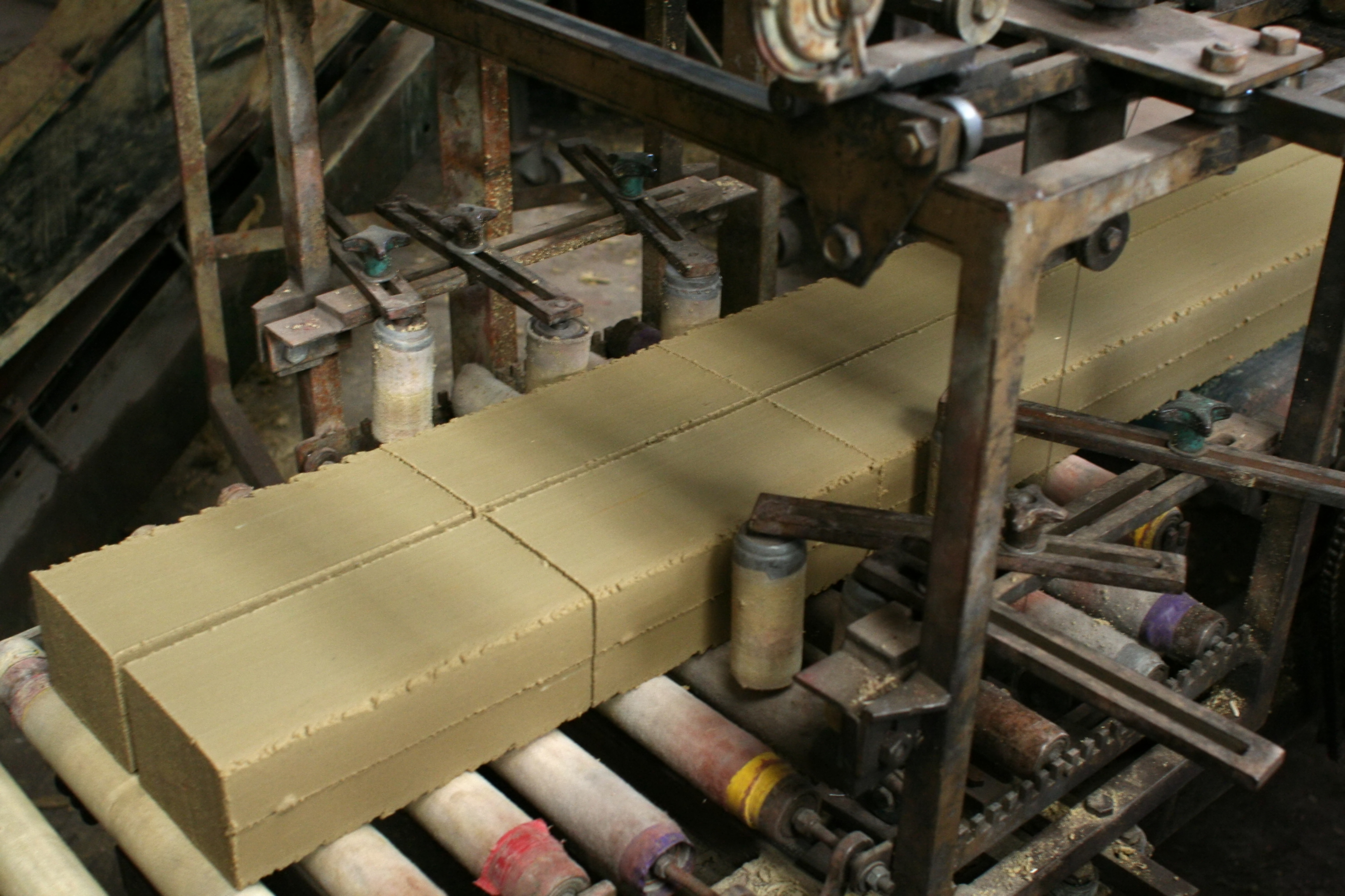 Fabrication de briques : fil à couper le beurre à la sortie de la filière.